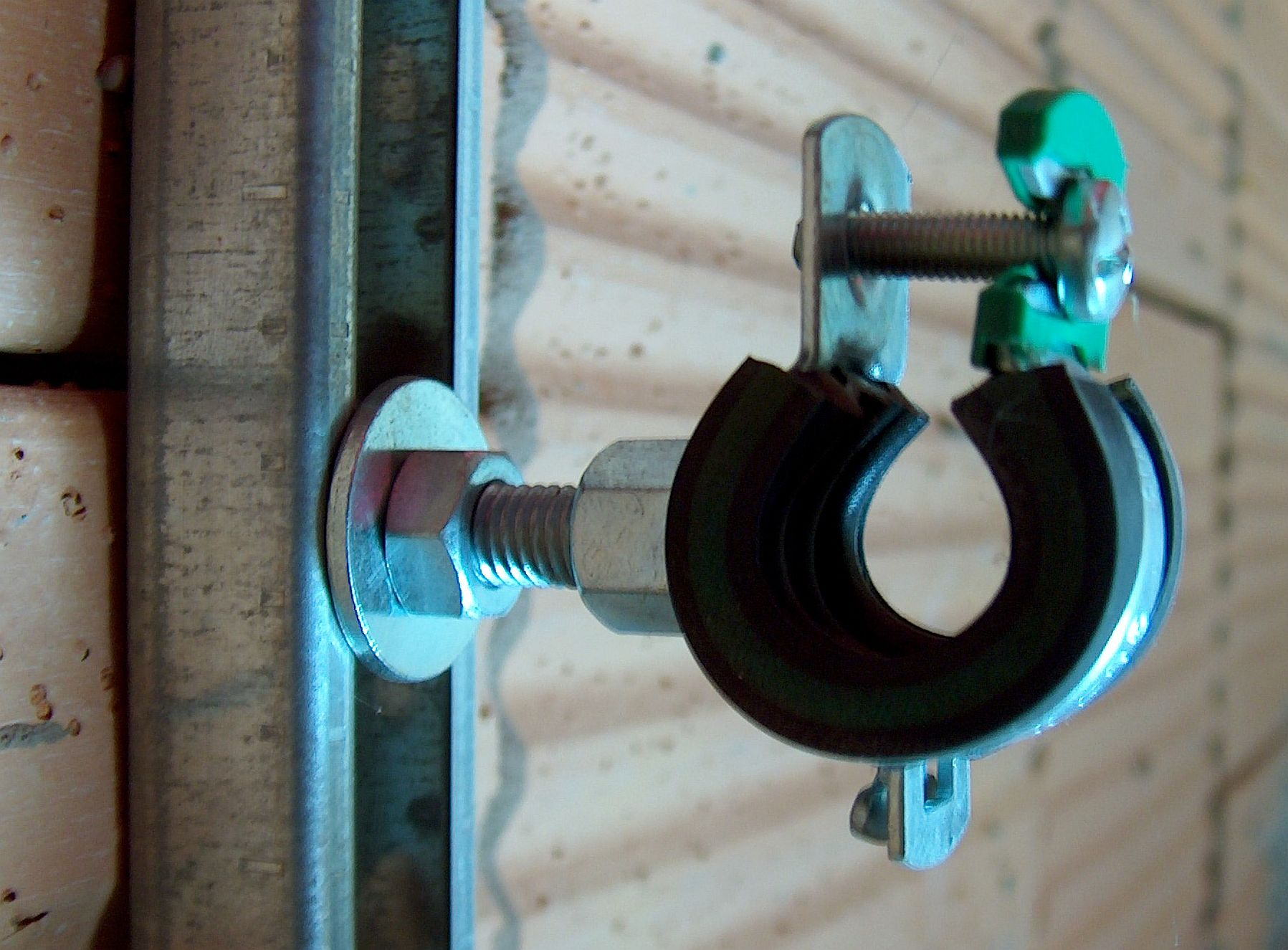 Rohrschelle ohne Rohr